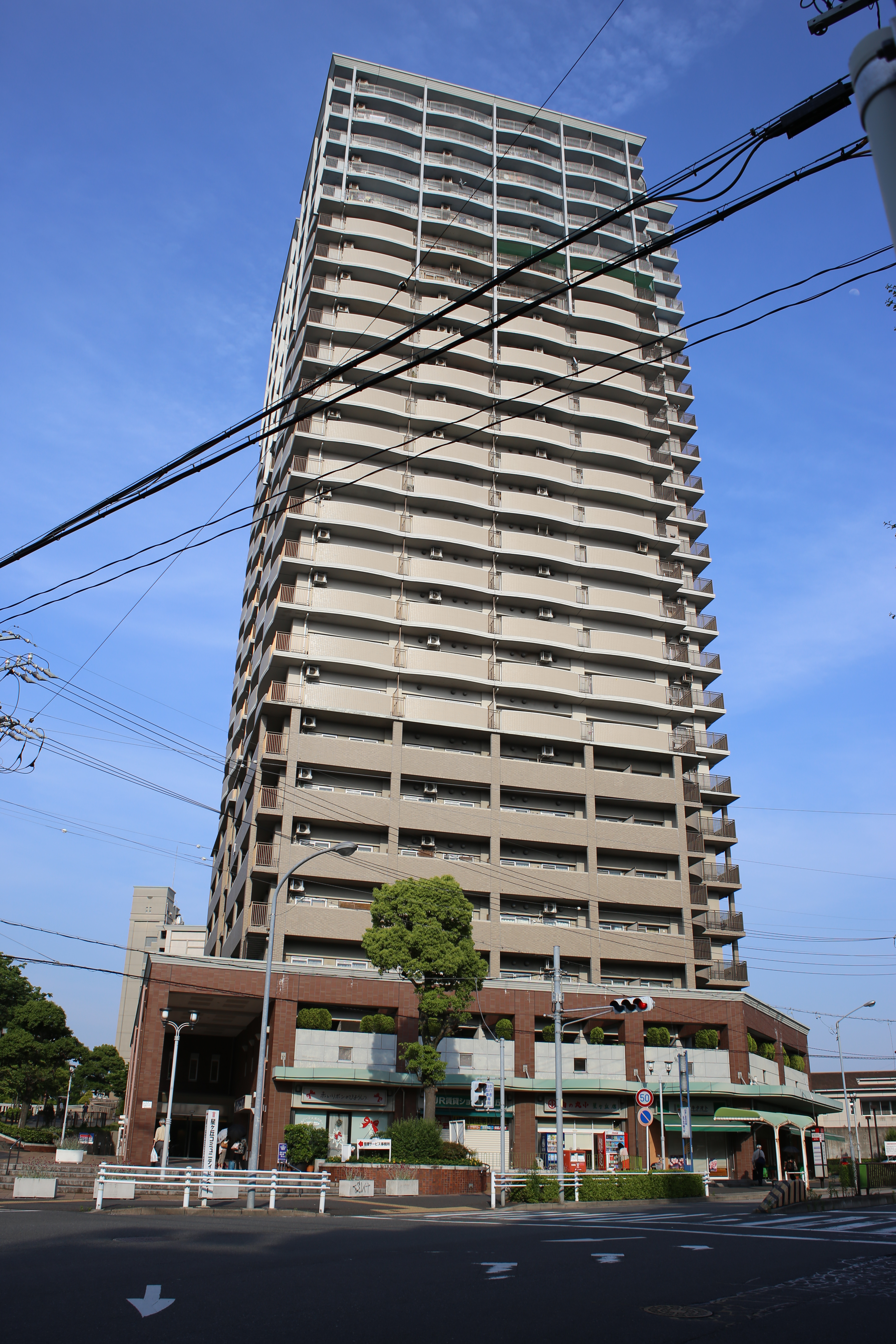 名古屋市千種区星ヶ丘のアーバンラフレ星ヶ丘10号棟を北西側より撮影